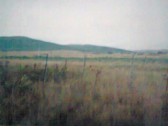 cerros de Aguas Blancas